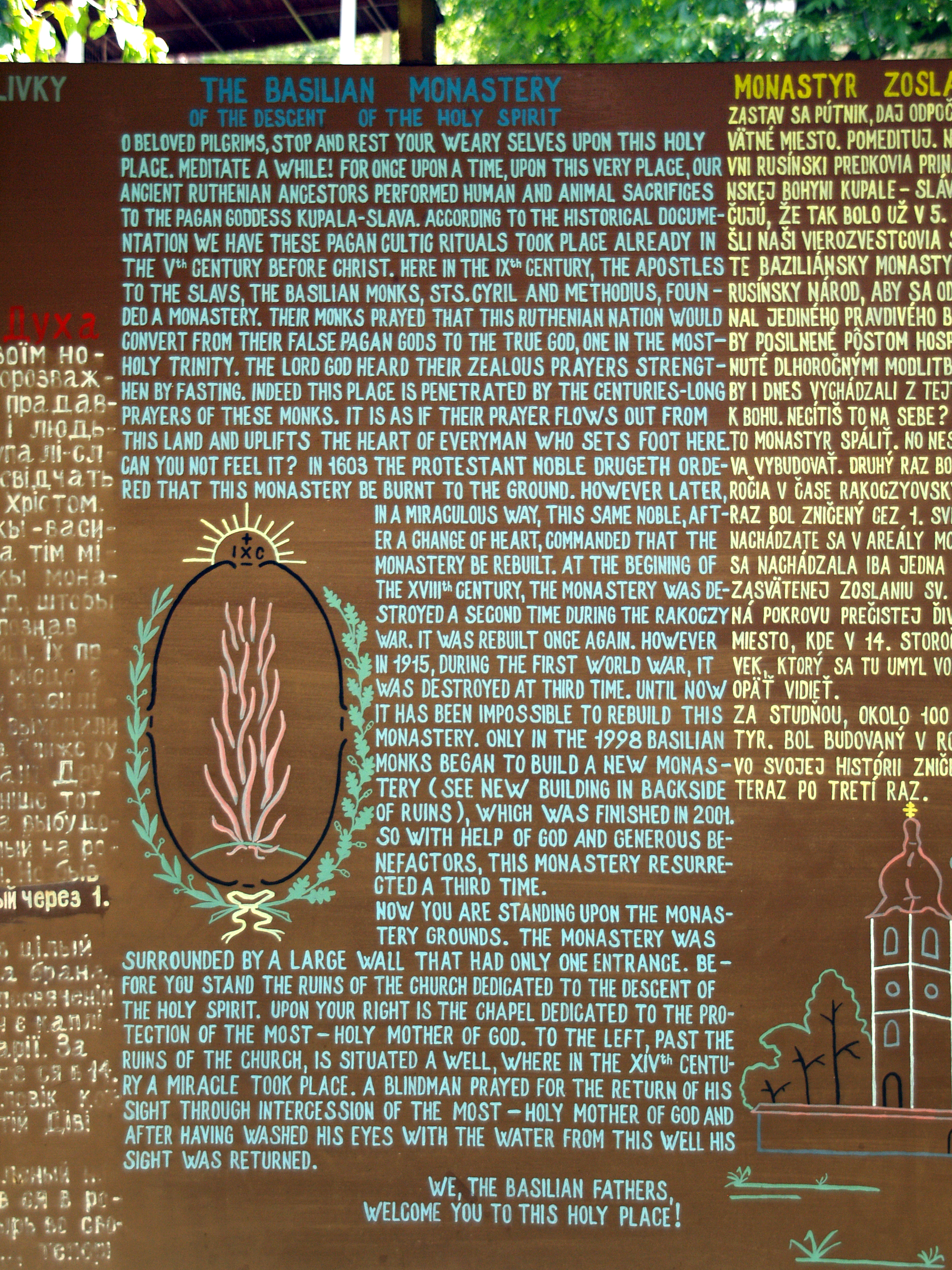 Krásny Brod, Prešov (Slovaquie) - Extrait anglais du panneau d'accueil au site du monastère de Krasznobród (Krásny Brod)